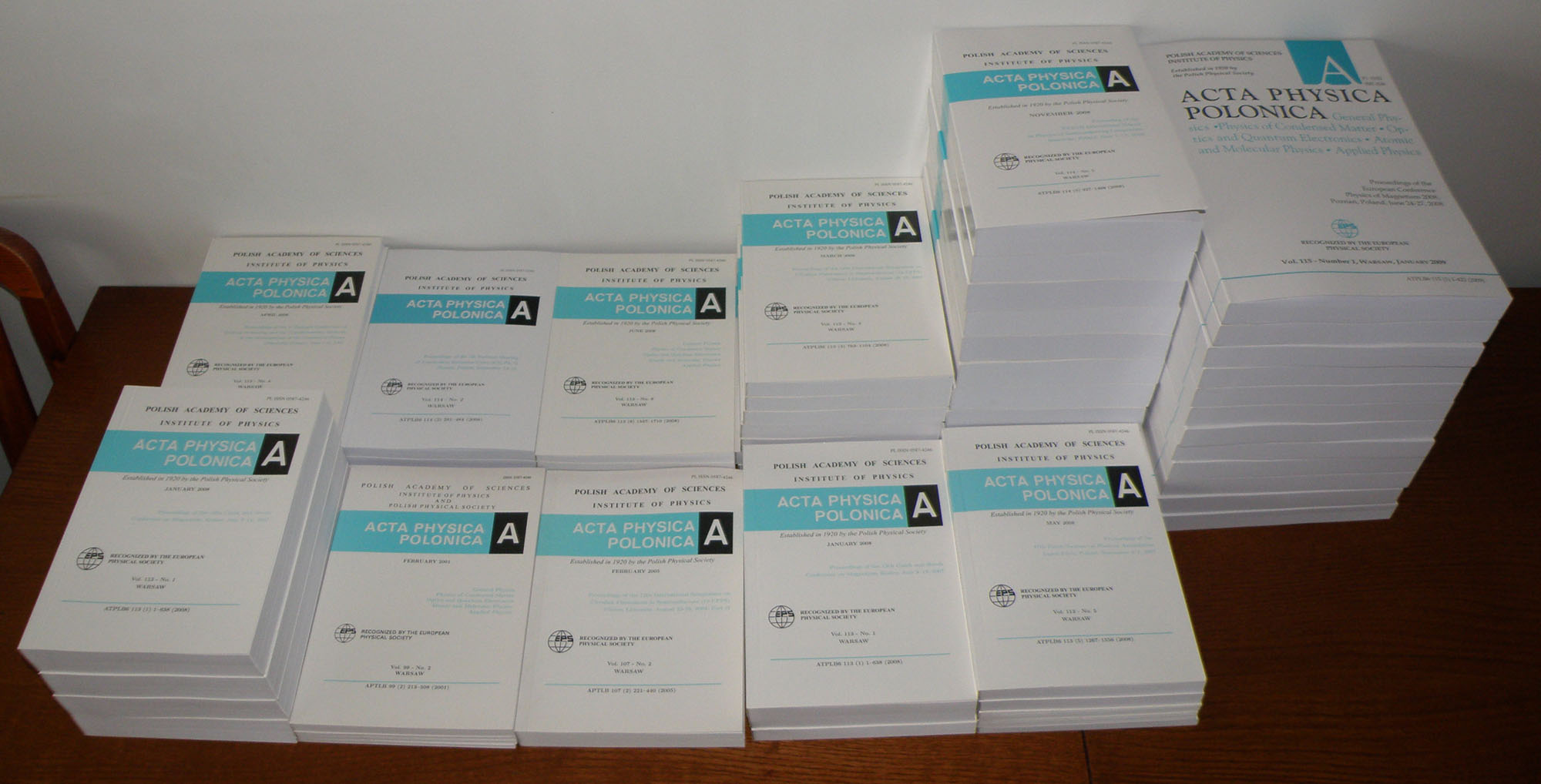 Acta Physica Polonica - miesięcznik naukowy poświęcony fizyce.